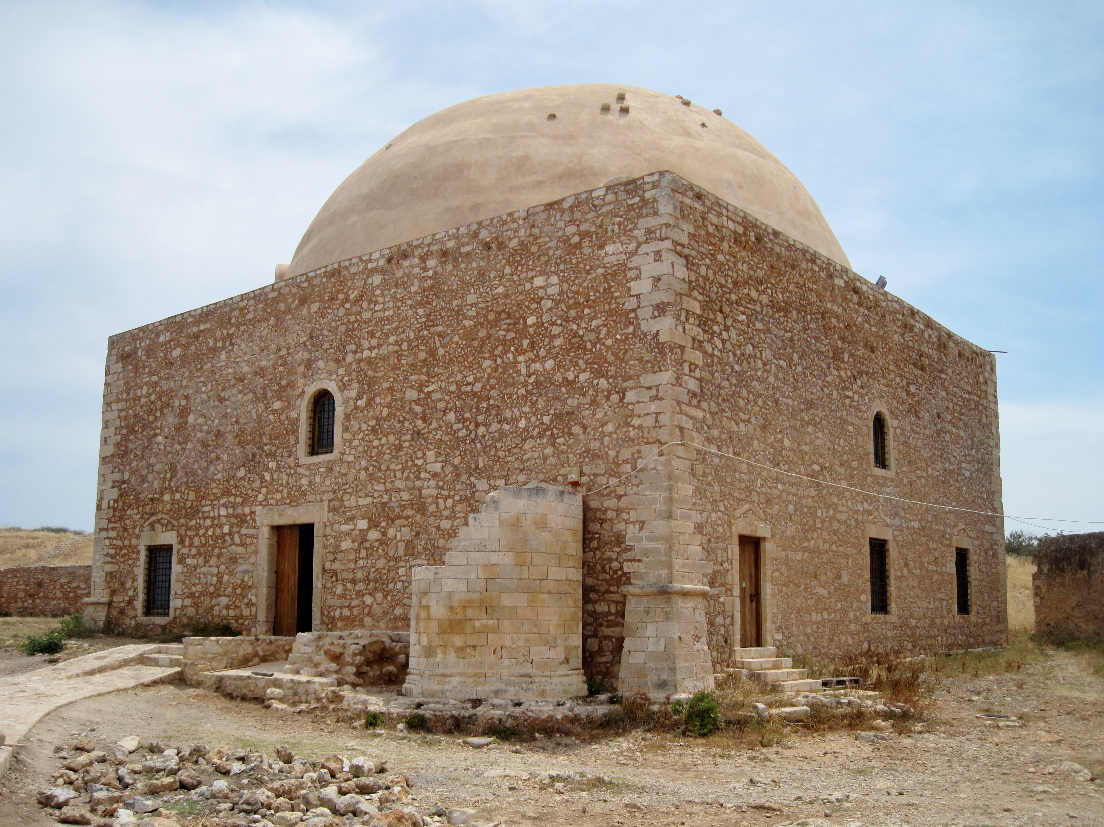 Sultan-Ibrahim-Moschee der Fortezza von Rethymno, Festungsanlage innerhalb der Stadt Rethymno, Regionalbezirk Rethymno, Kreta, Griechenland - Former cathedral Sainte-Marie-des-Anges.